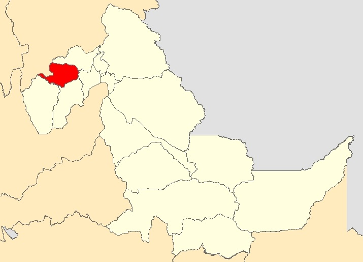 Mapa distrito Curimaná,Ucayali - Perú